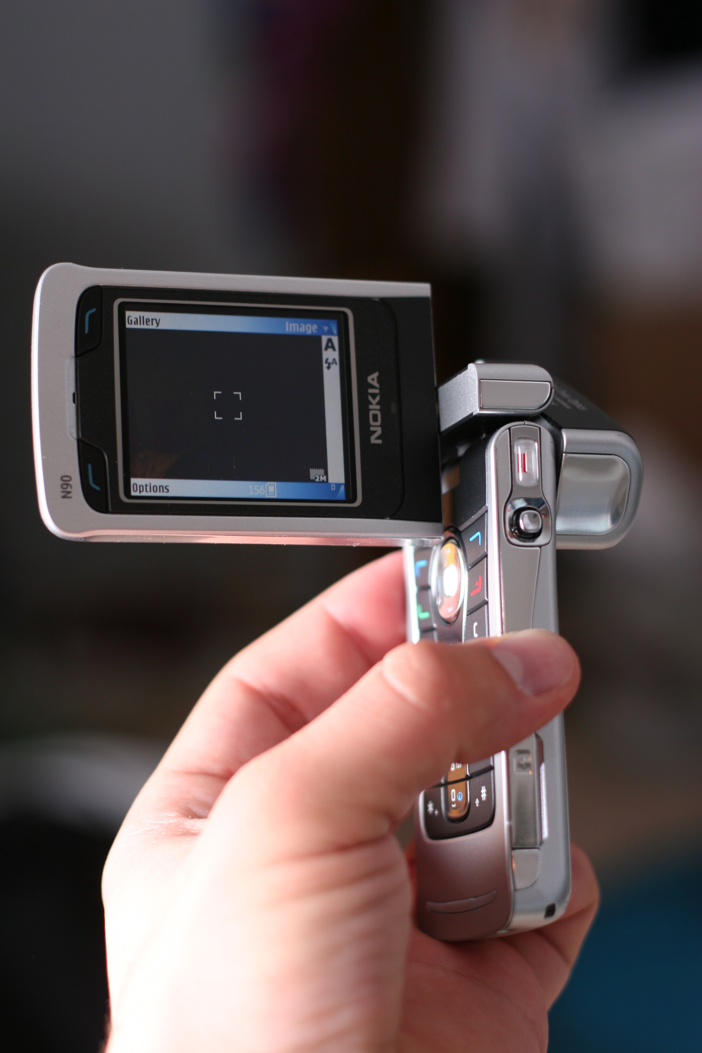 Teléfono móvil Nokia N90 en Modo Cámara